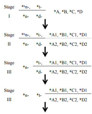 The process of tonal split in Proto-Tai descendants.